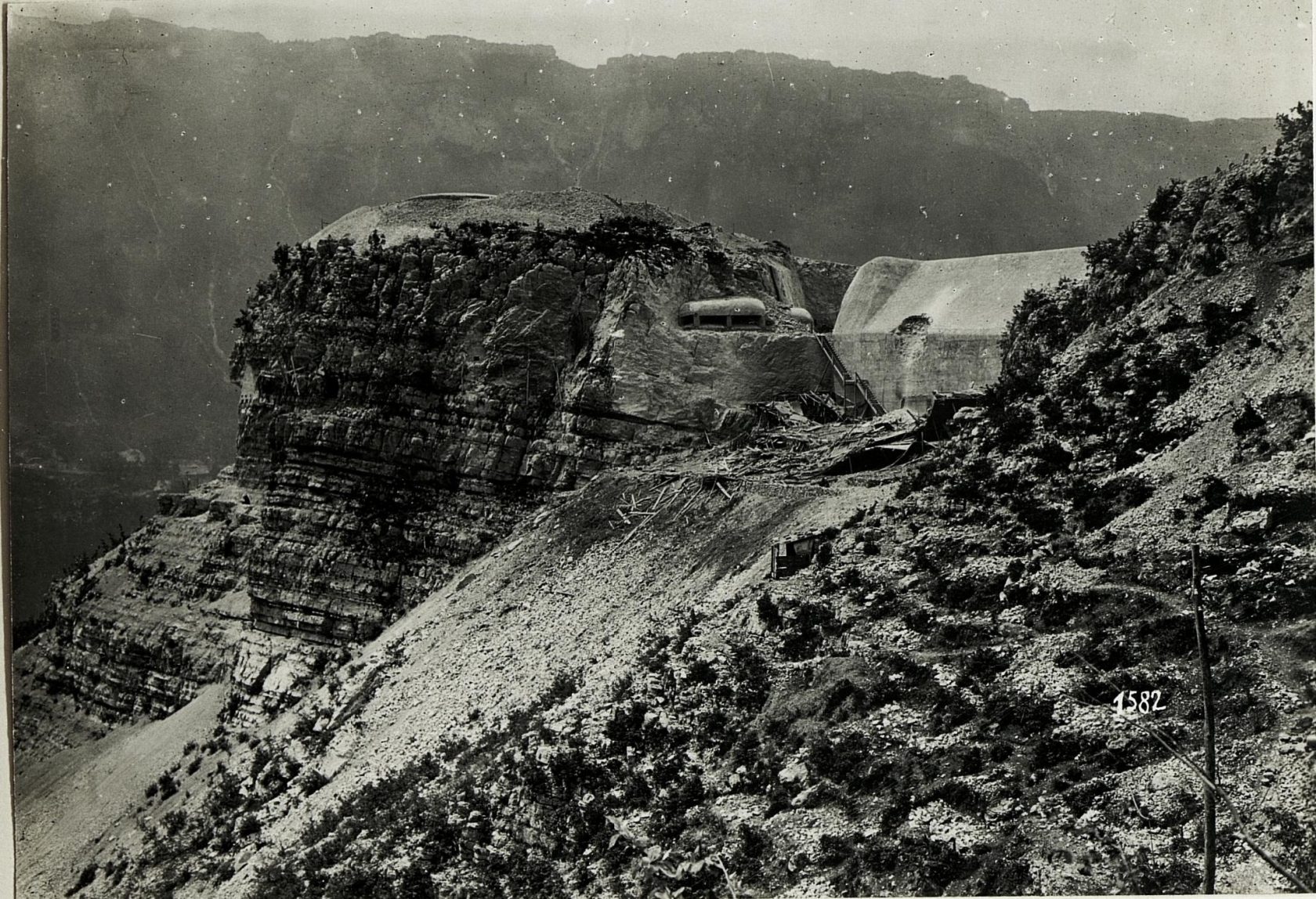 Werk Valmorbia von italienischer Seite aufgenommen.